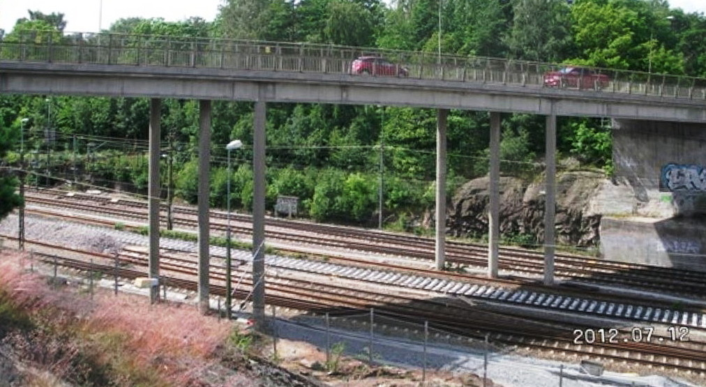 Västberga allé, betongbro över stammbanan